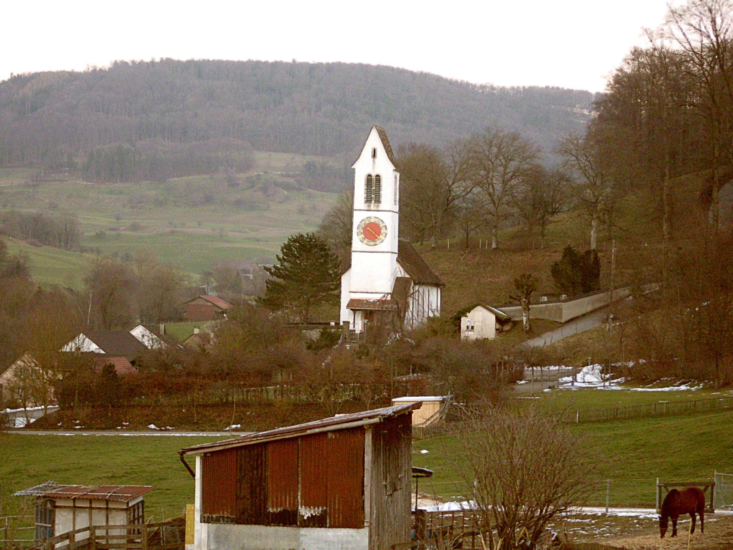 Teilansicht von Ormalingen, Schweiz